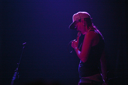 Salle de fêtes a Droixhe (Liège), 3.7.07.